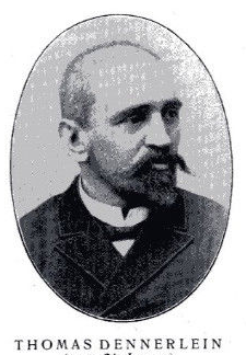 Der Bildhauer Thomas Dennerlein, gestorben 1903